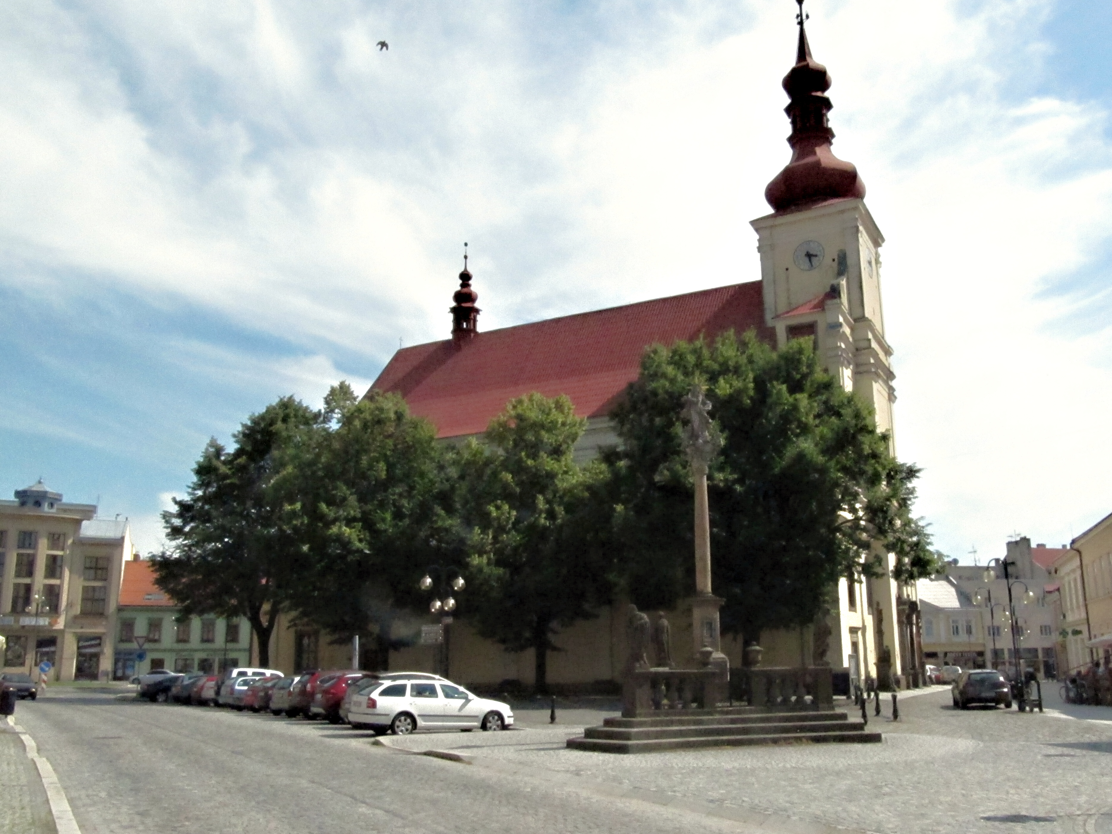 Holešov, Kostel Nanebevzetí Panny Marie